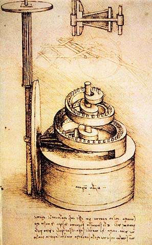 Чертеж фузеи работы Леонардо да Винчи